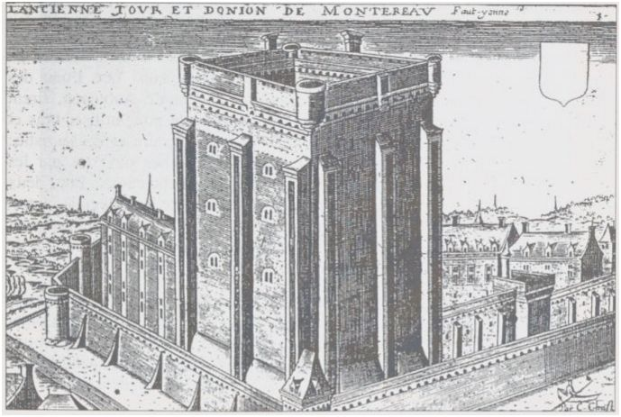 Dessin